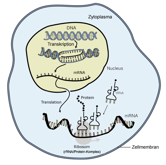 DNA, RNA, transcription, translation